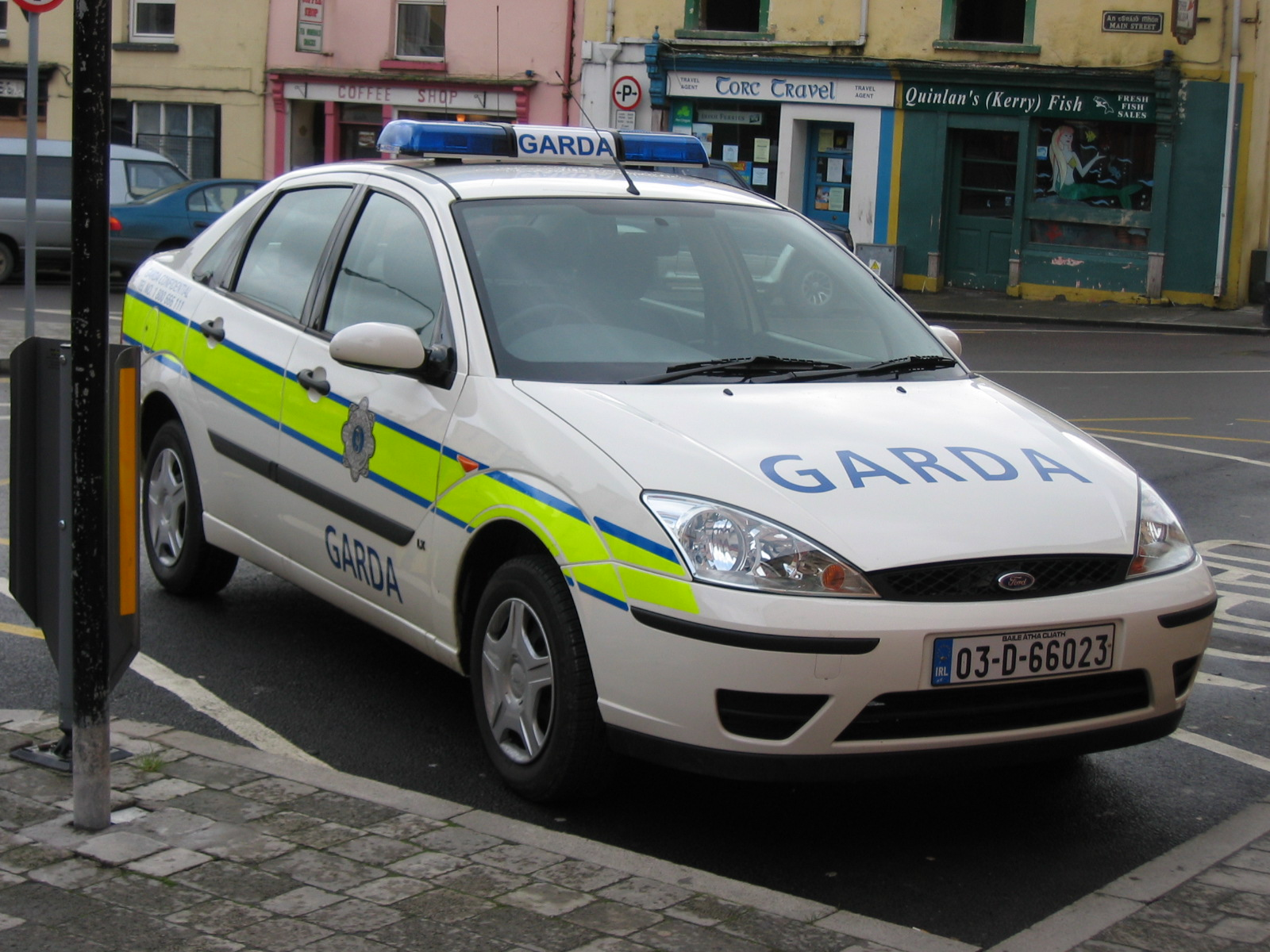 Garda car, Ireland